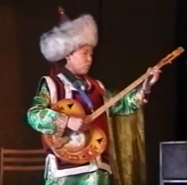 Viro ludas Ŝanzio.